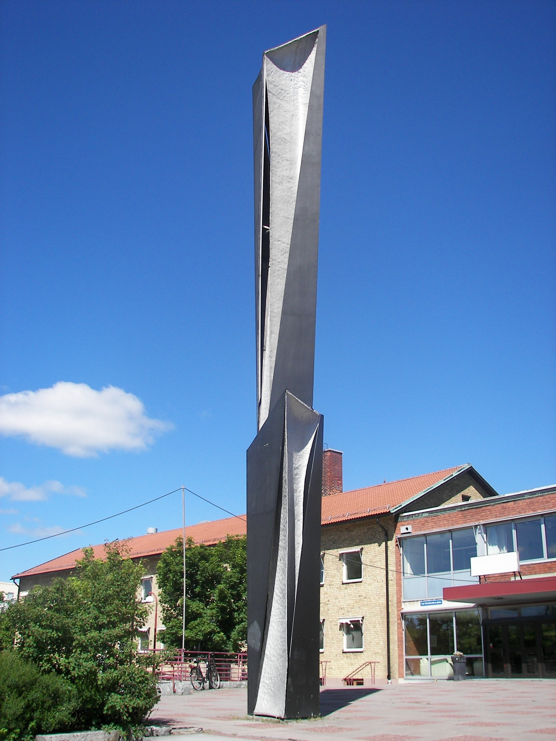 Spiral reflex av Arne Jones på Ivar Nordlanders plats i Skönsberg, Sundvall